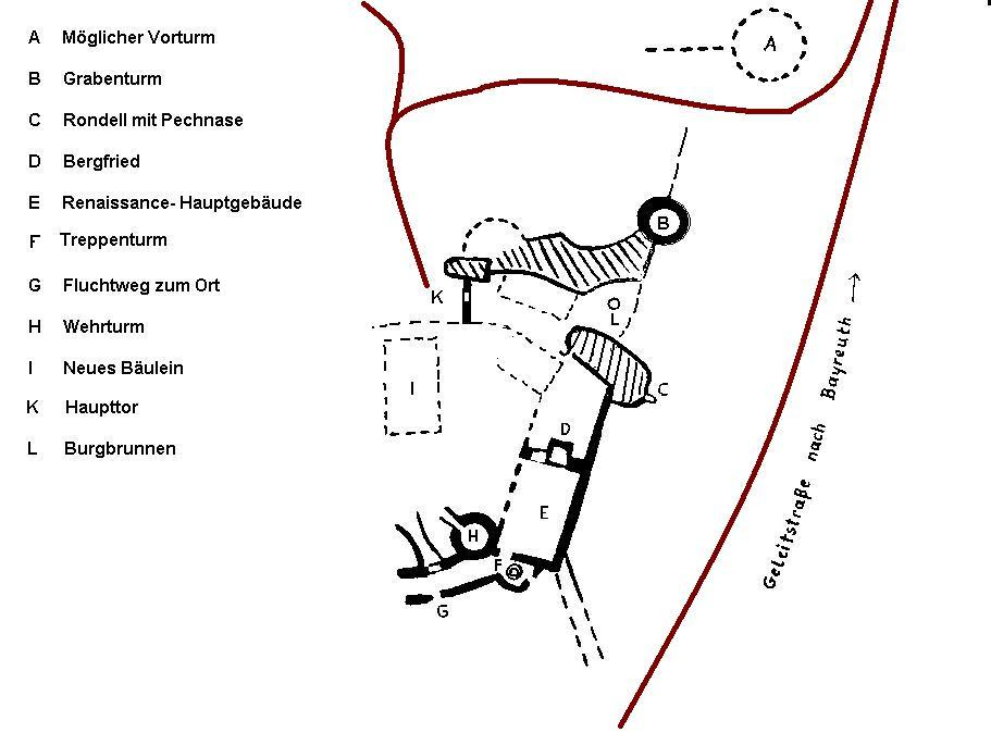 Grundriß der Burg Streitburg im Jahr 1760 in Streitberg; own work. Quelle: Gustav Voit, gemeinfrei durch Panoramafreiheit